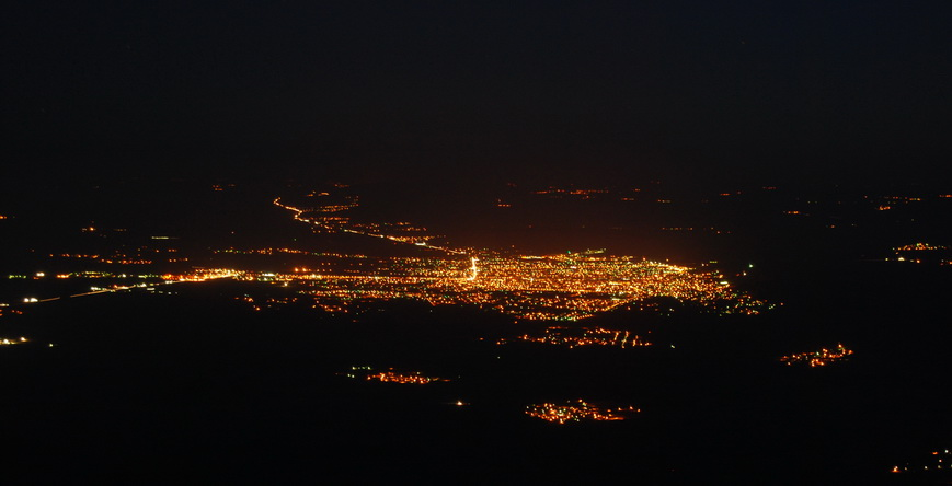 Fotoğraf bana aittir. 22 ağustos 2009'da çekilmiştir.